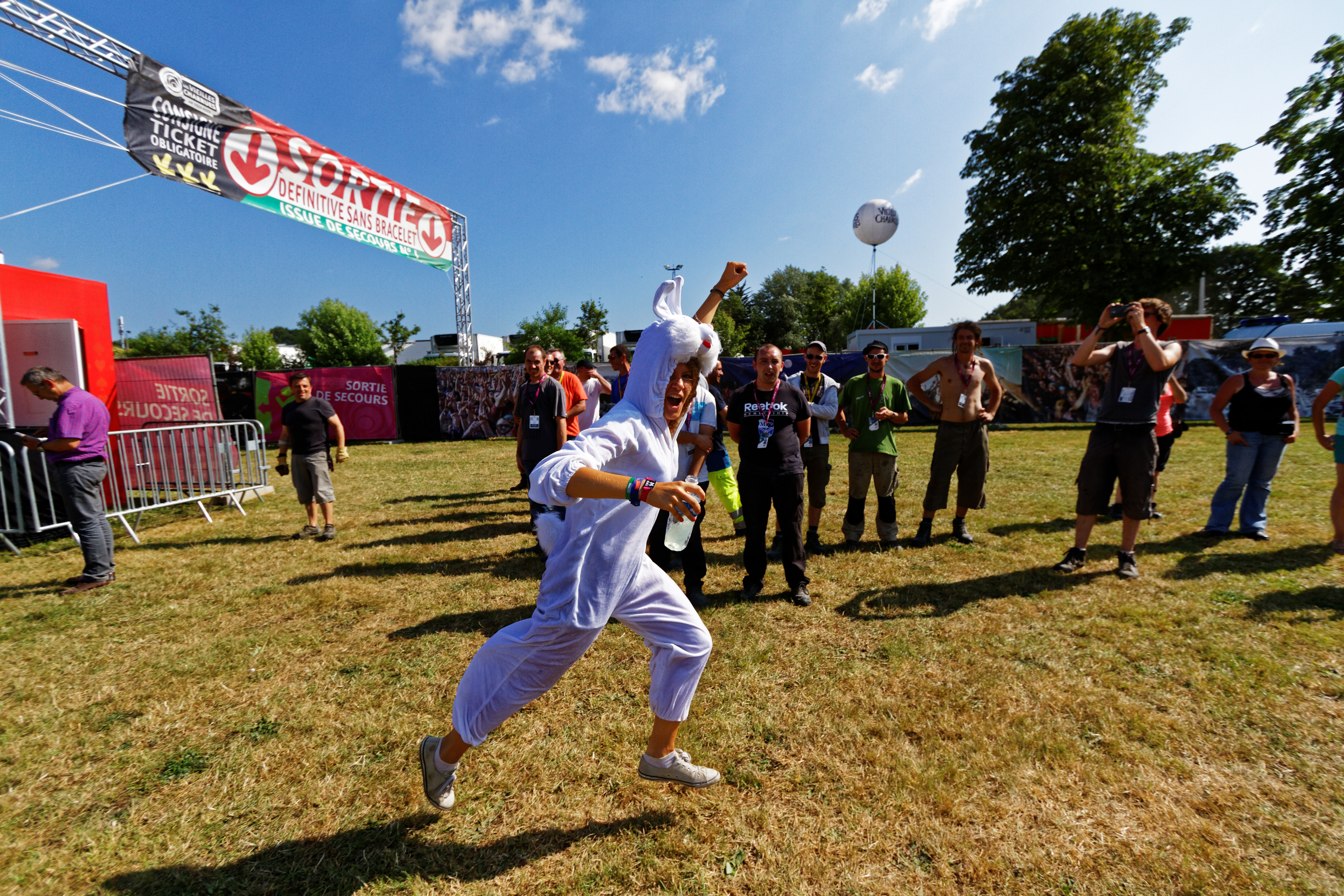 L'entrée des festivaliers lors du festival des Vieilles Charrues 2015.